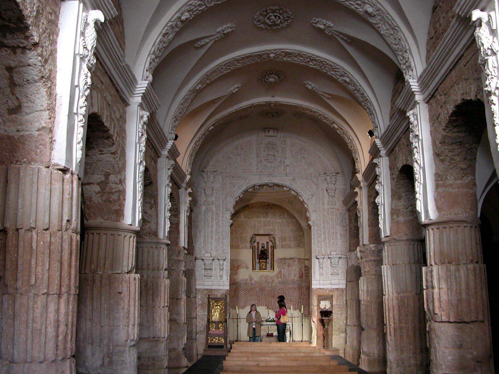 Basílica de Santa María de los Arcos en Tricio, La Rioja - España.